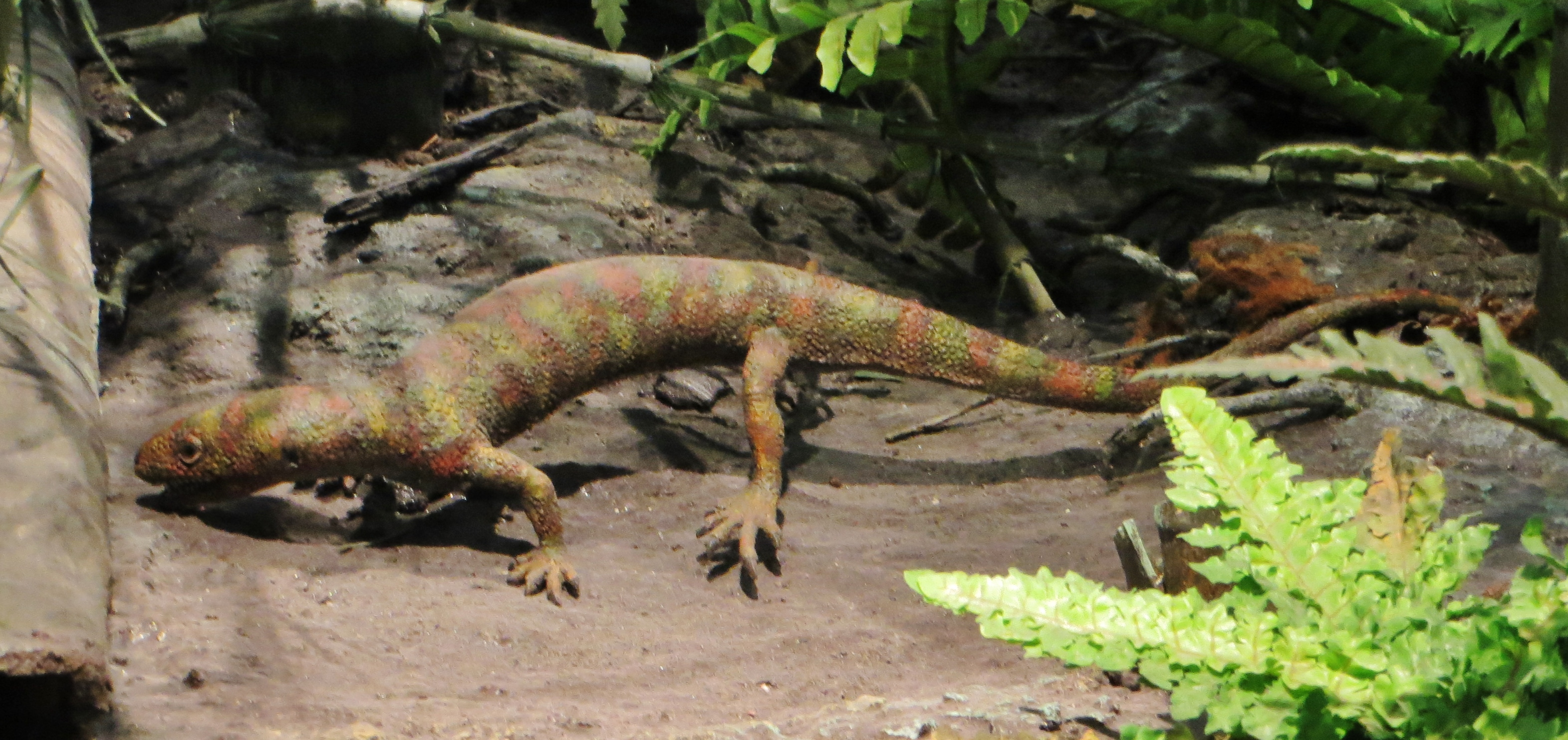 Model of Hylonomus - Took the picture at Museum am Lowentor, Stuttgart